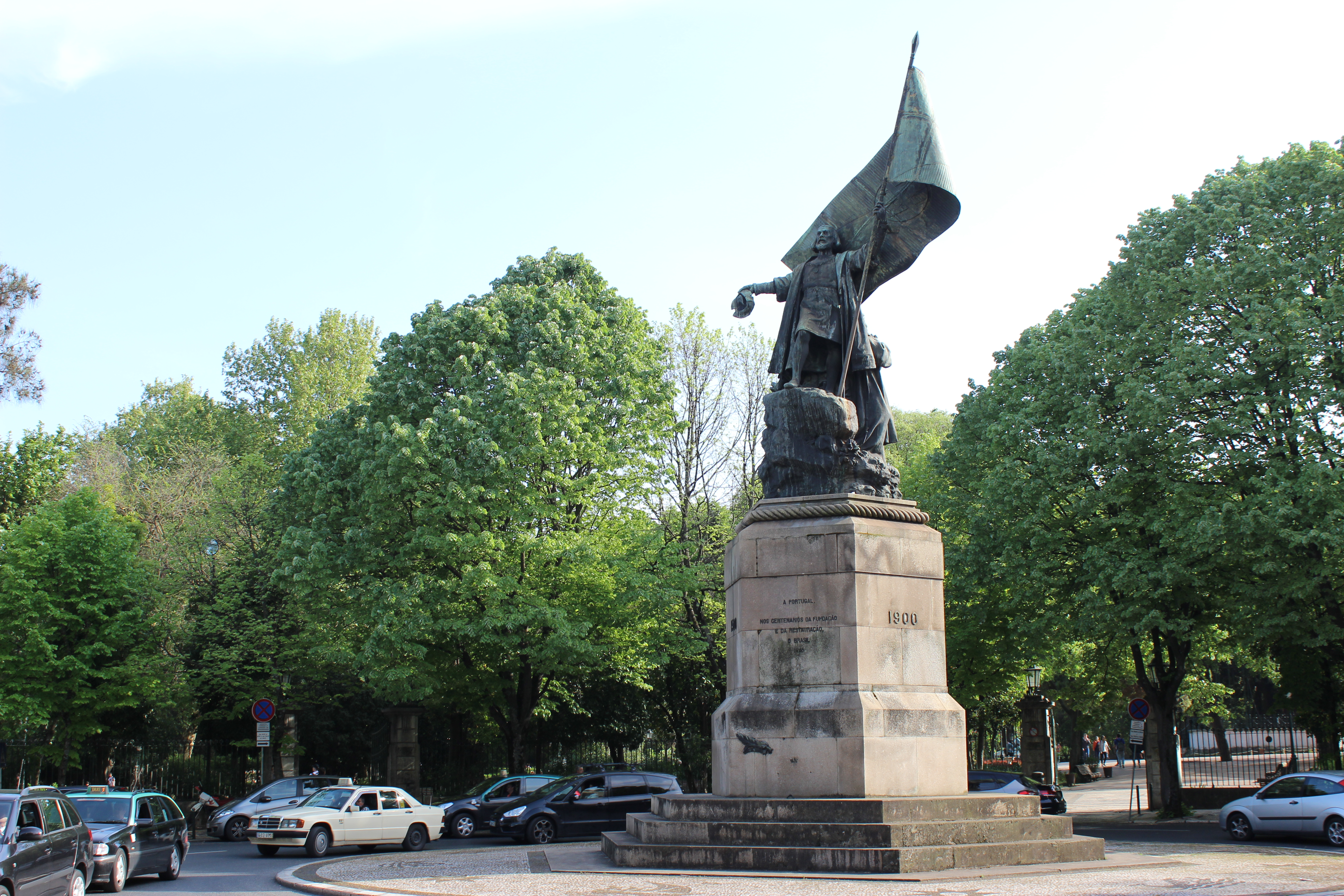 Lisboa / Lisbon